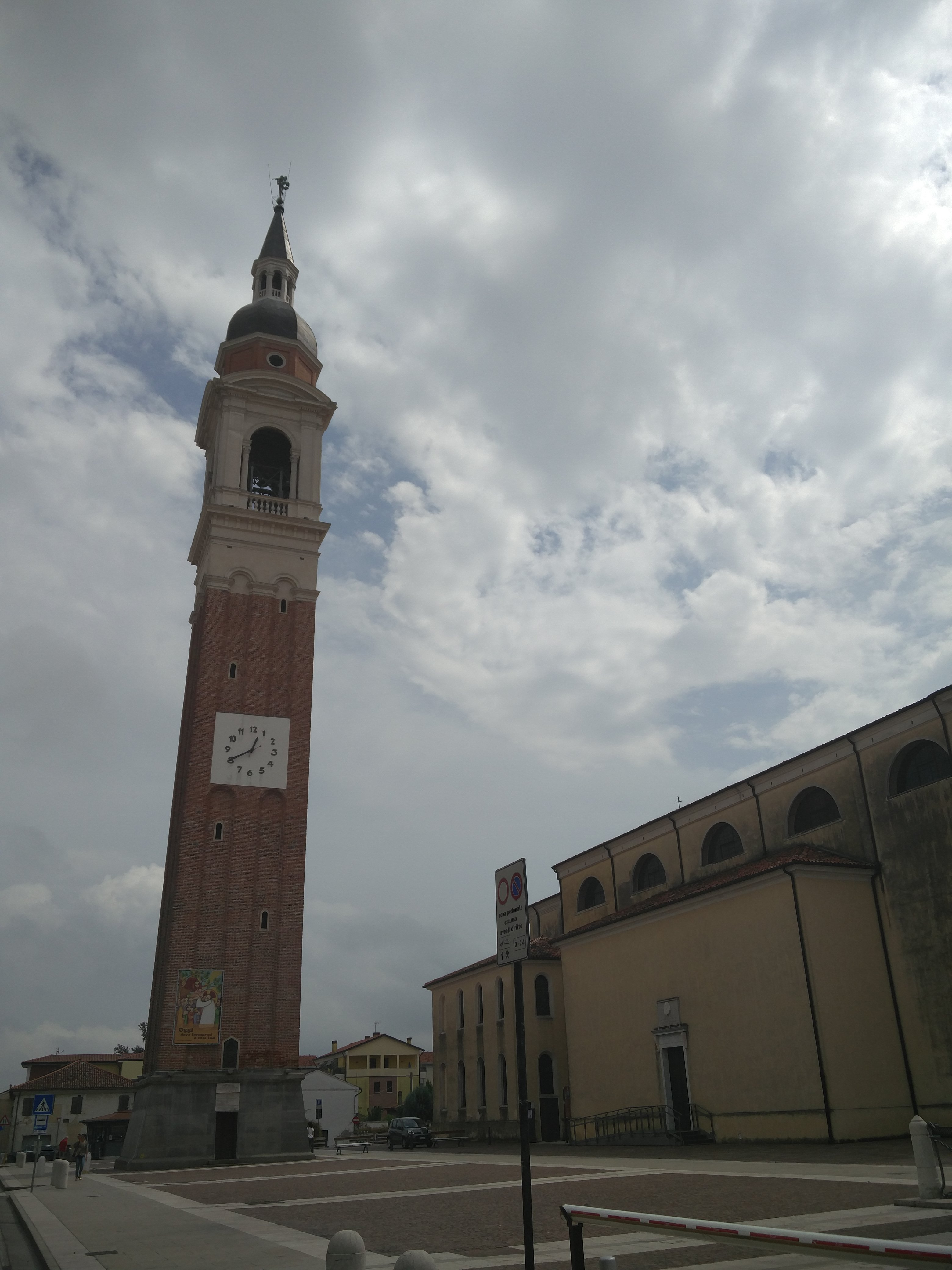 Campanile di Salzano visto da via Roma